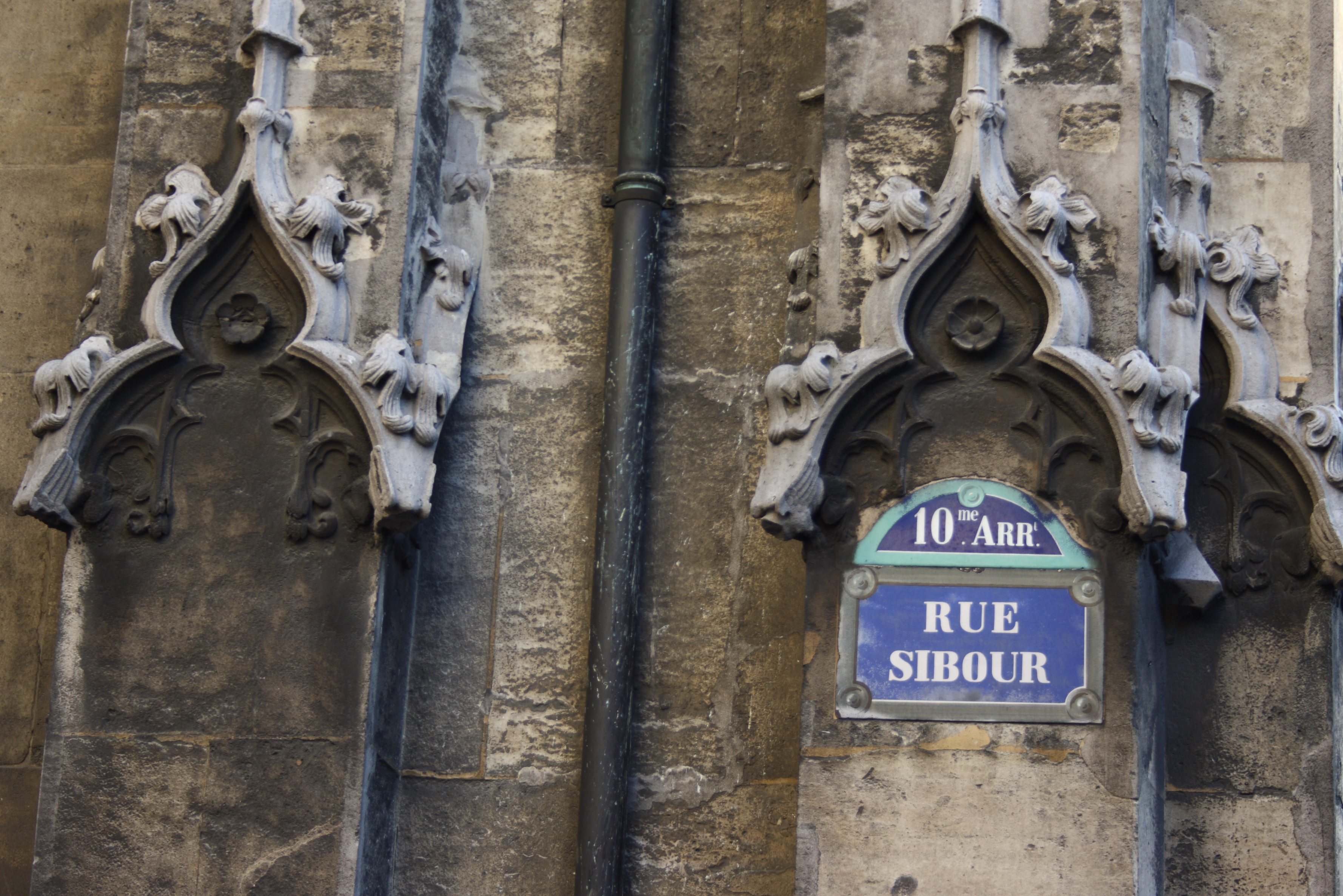 Straßenschild an der katholischen Pfarrkirche Saint-Laurent im 10. Arrondissement von Paris, Rue Sibour